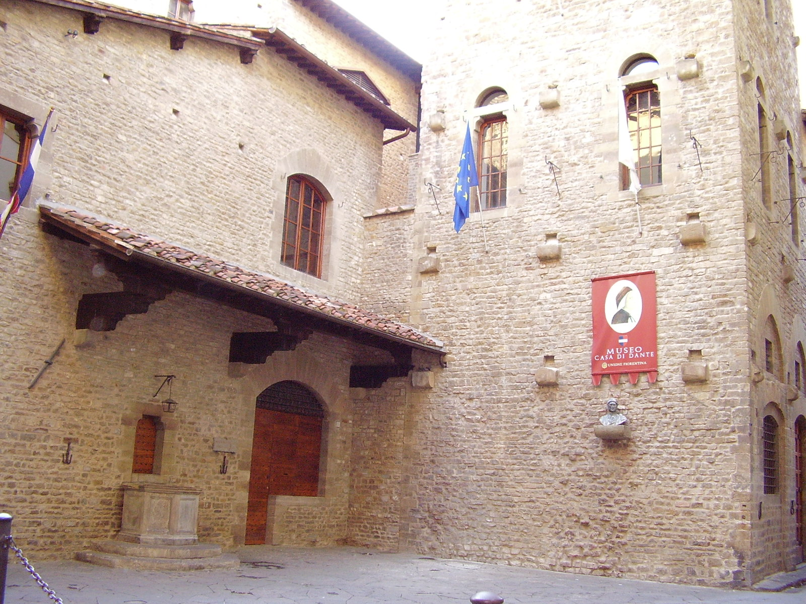 casa di dante museum (medioeval restored house) in Florence, Italy